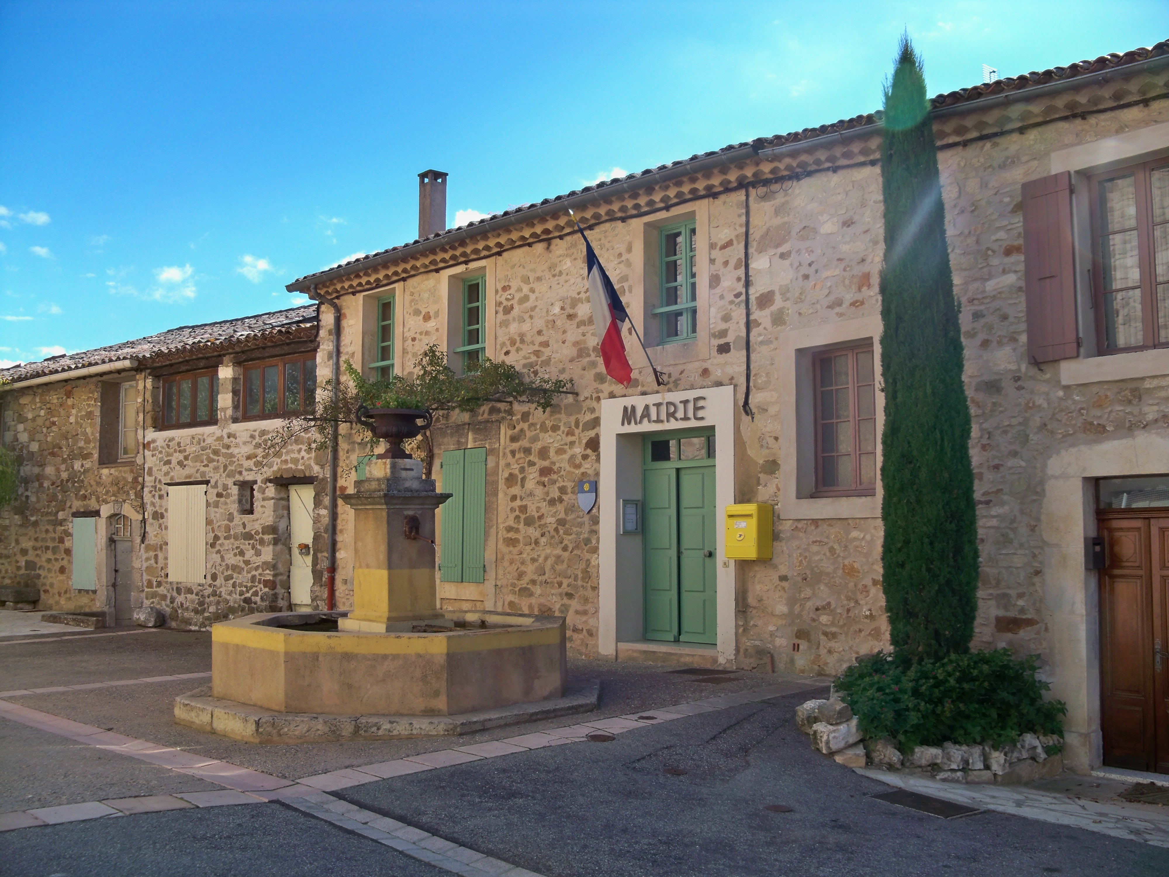 Mairie de Gignac, Vaucluse, France